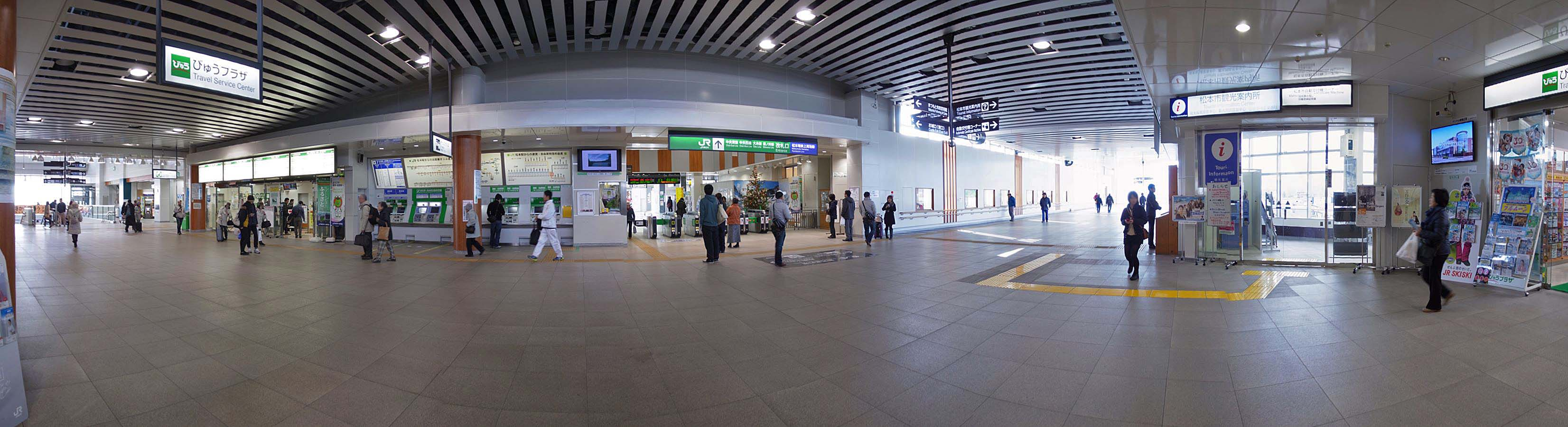 JR Matsumoto sta. , JR松本駅